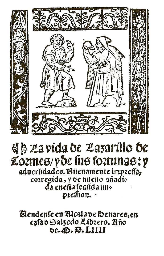 La vida de Lazarillo de Tormes, y de sus fortunas y aduersidades. Nuevamente impresa, corregida, y de nuevo añadida en esta segunda impresión. Alcalá de Henares, Salcedo, 1554.